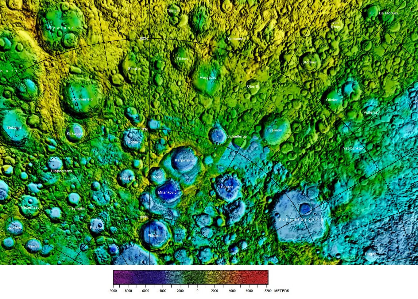 Cráter lunar Olivier. Localización. (Imagen LRO)